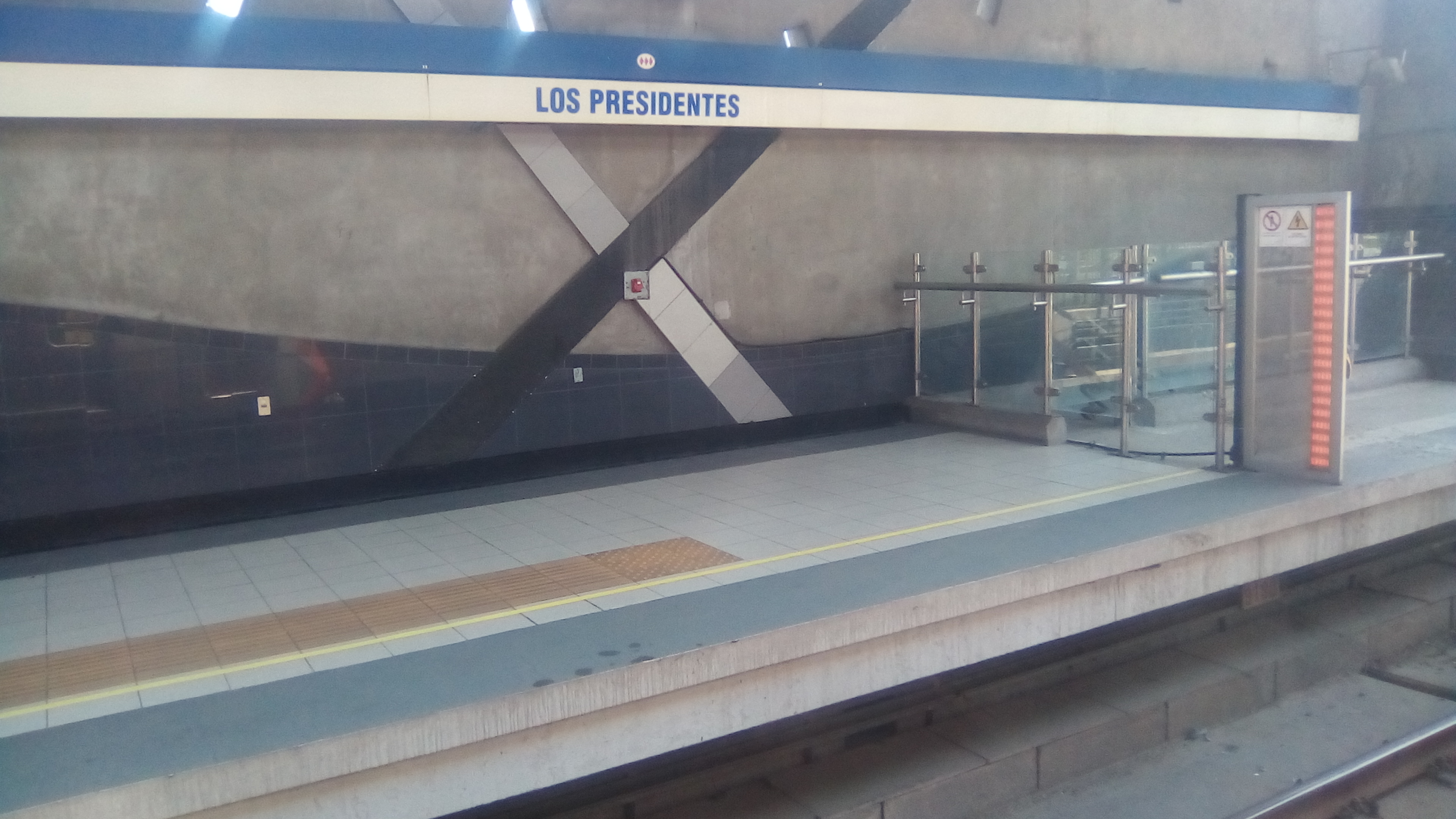 Estación Los Presidentes (2018)